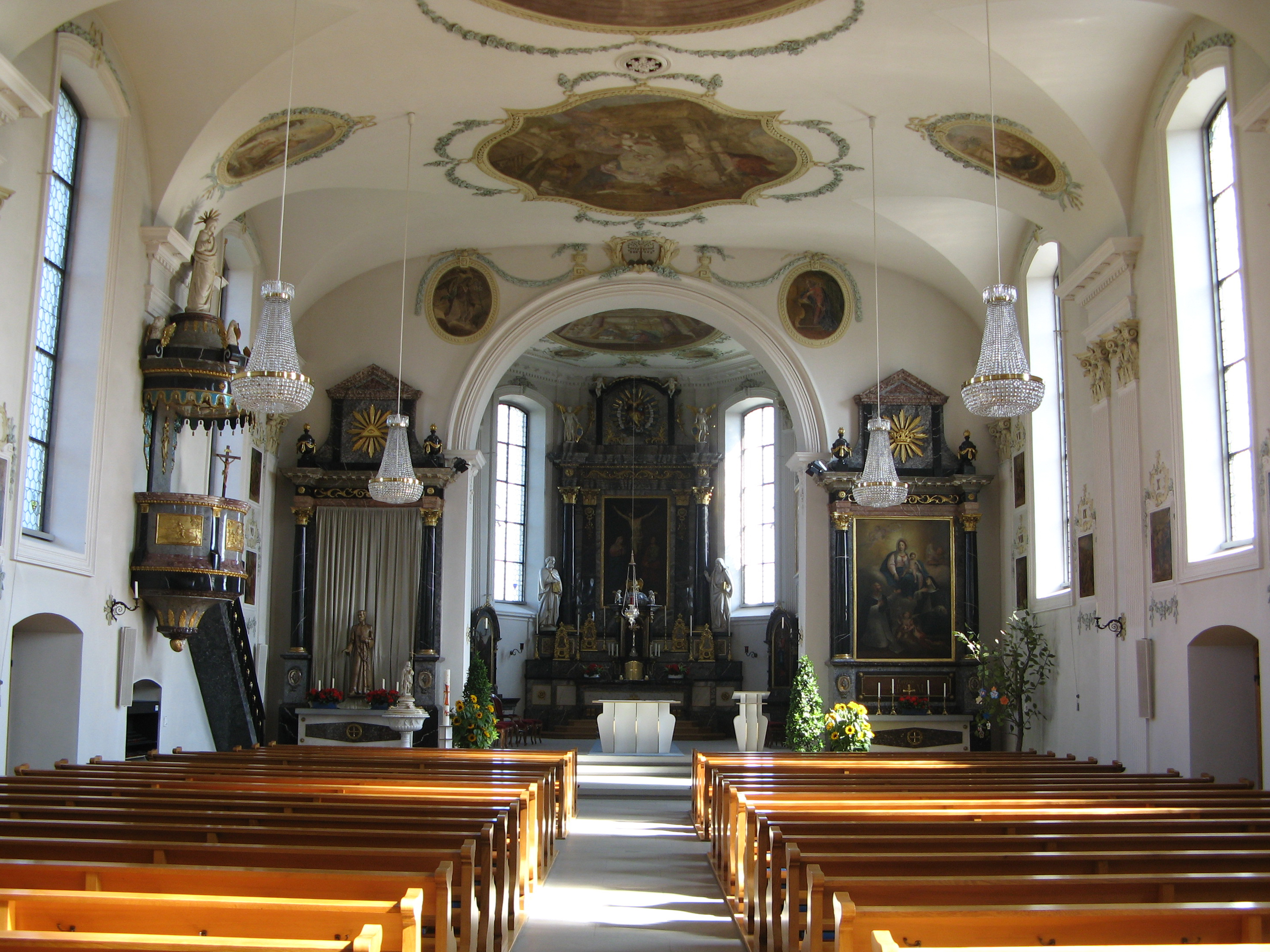 Innenraum der Pfarrkirche Mariä Geburt in Sins